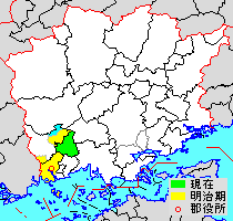 岡山県小田郡の範囲